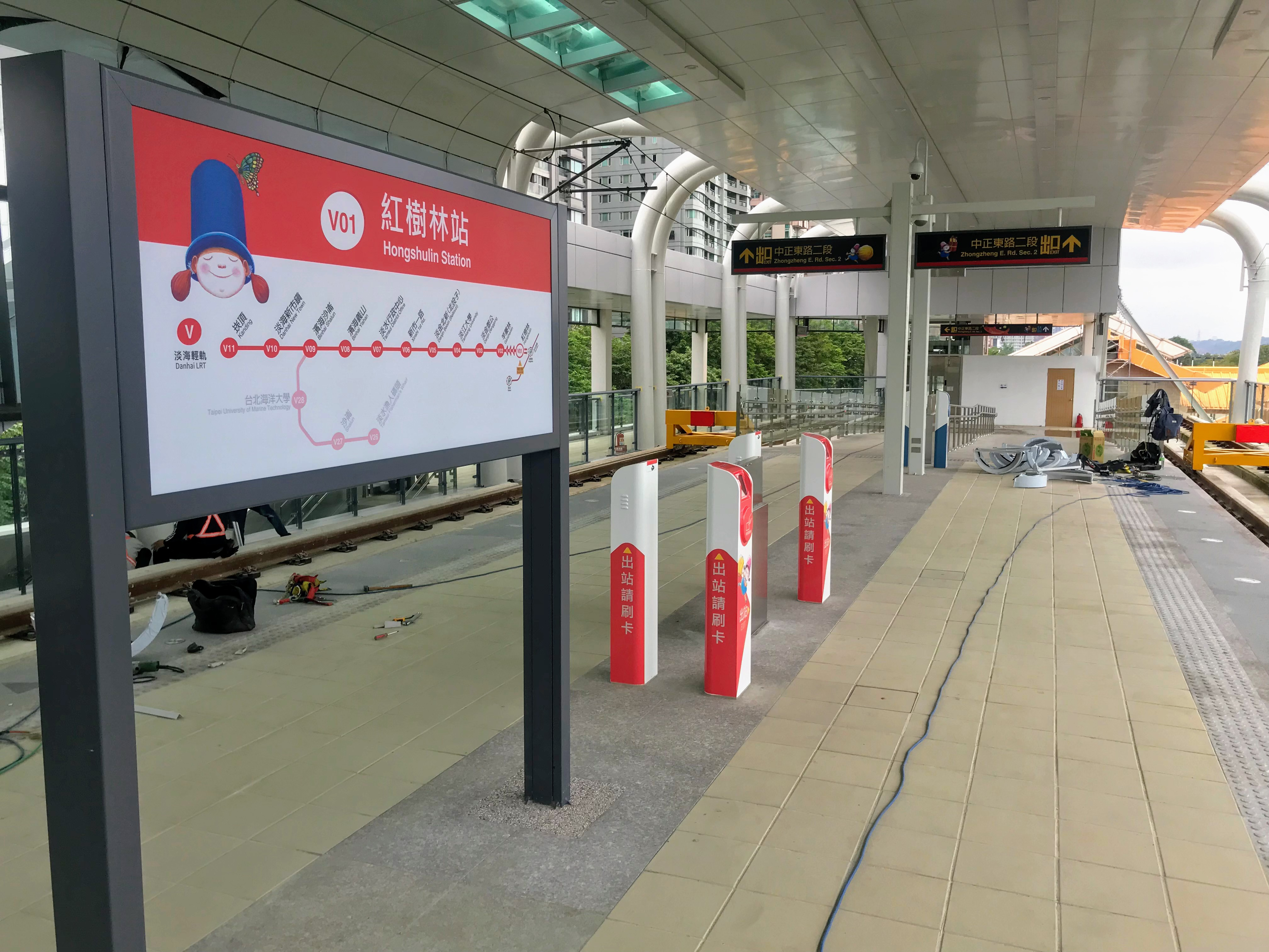 中文（台灣）: 淡海輕軌紅樹林站